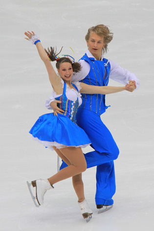 Lucie Myslivečková / Matěj Novák at the 2009 NHK Trophy. OD.